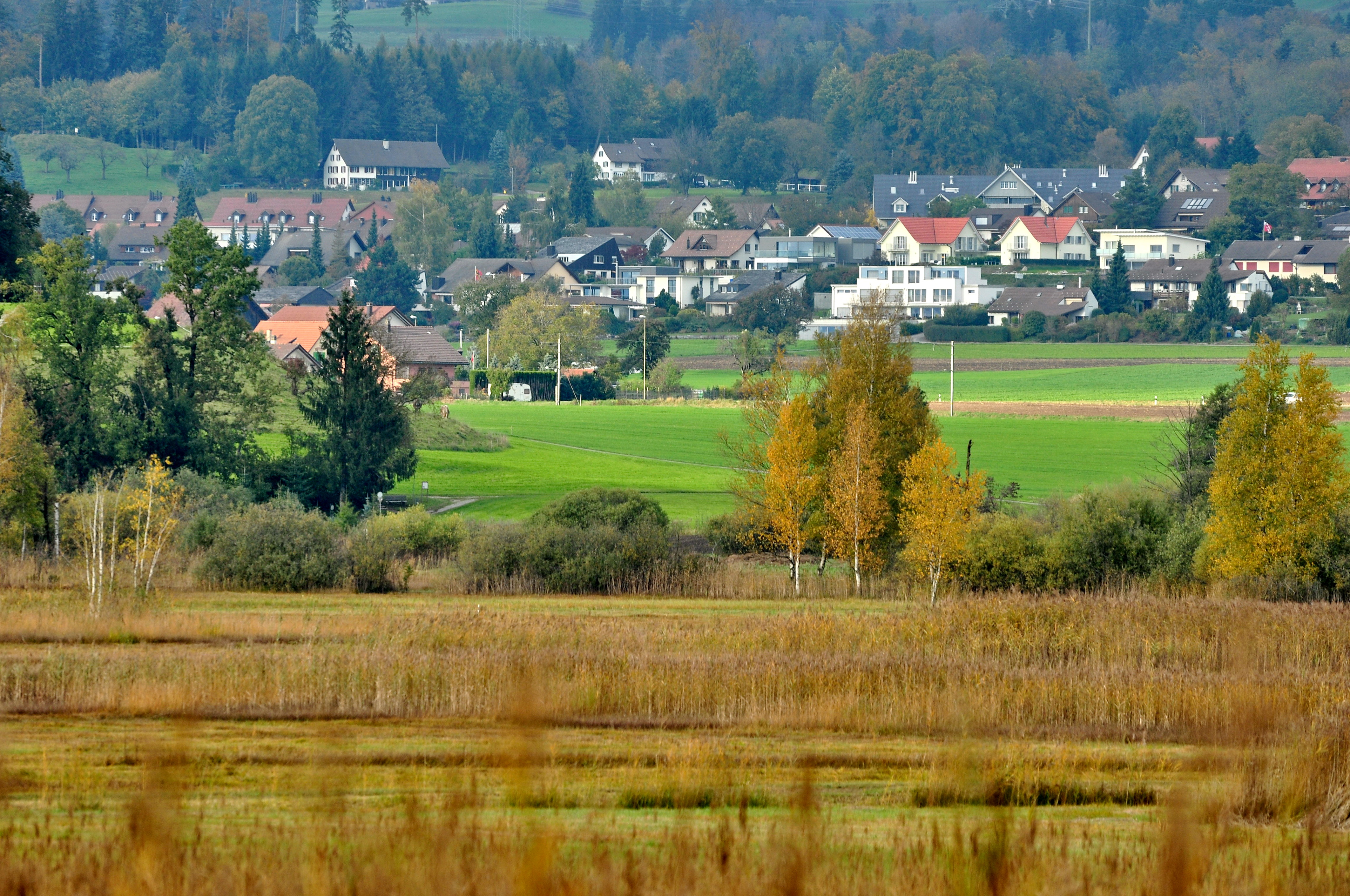 Irgenhausen as seen from between Irgenhausen castrum and Auslikon (Switzerland)